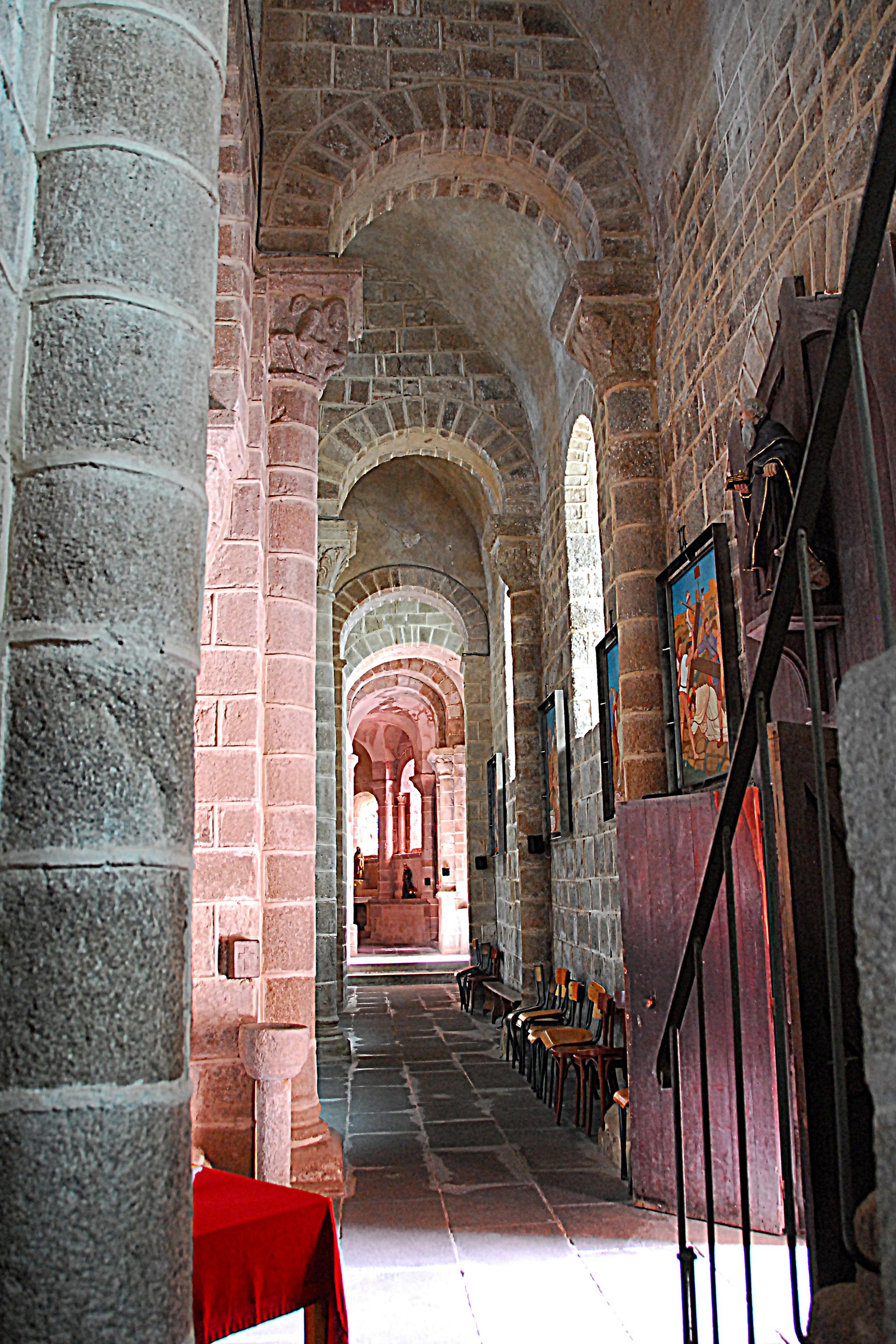 N.-D. de Châtel-Montagne, südl. Seitenschiff aus Joch 1